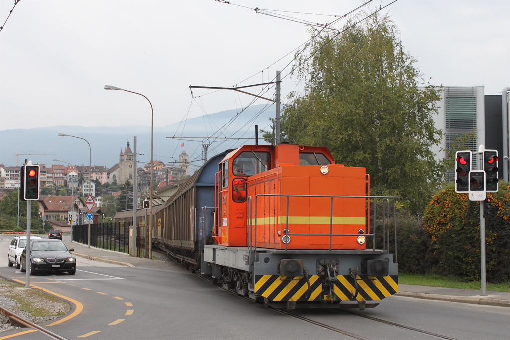 Em 3/3 3 de l'Orbe-Chavornay (Travys) sur une voie de raccordement à Orbe.